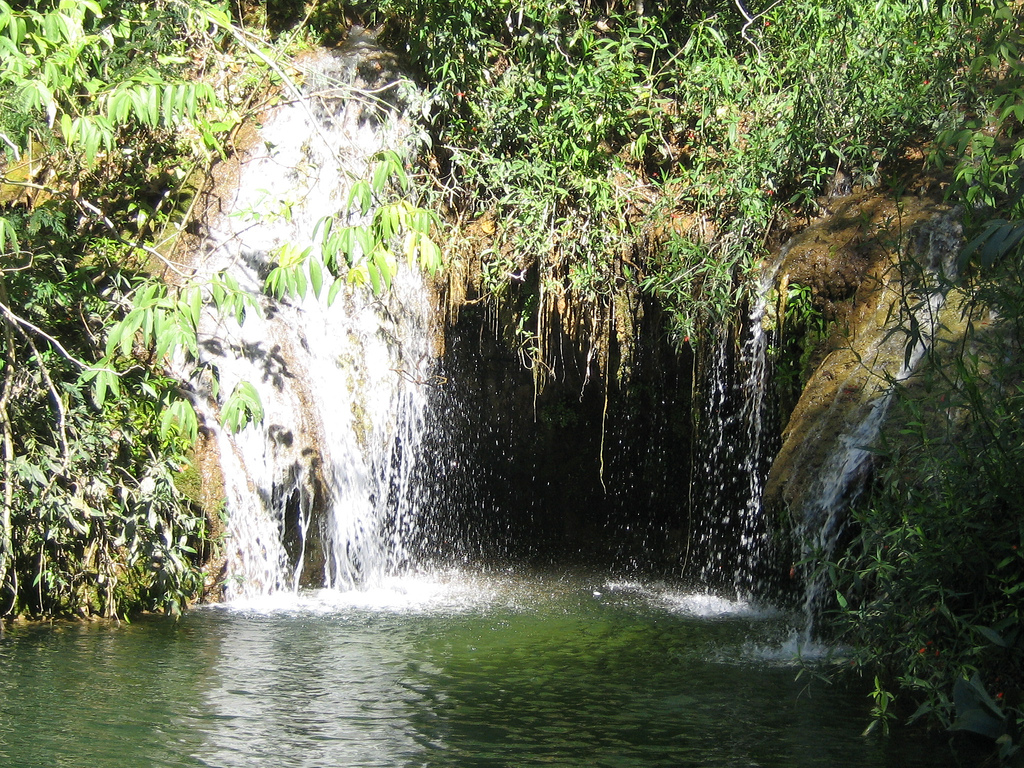 Cachoeira em Bonito.chachoeira